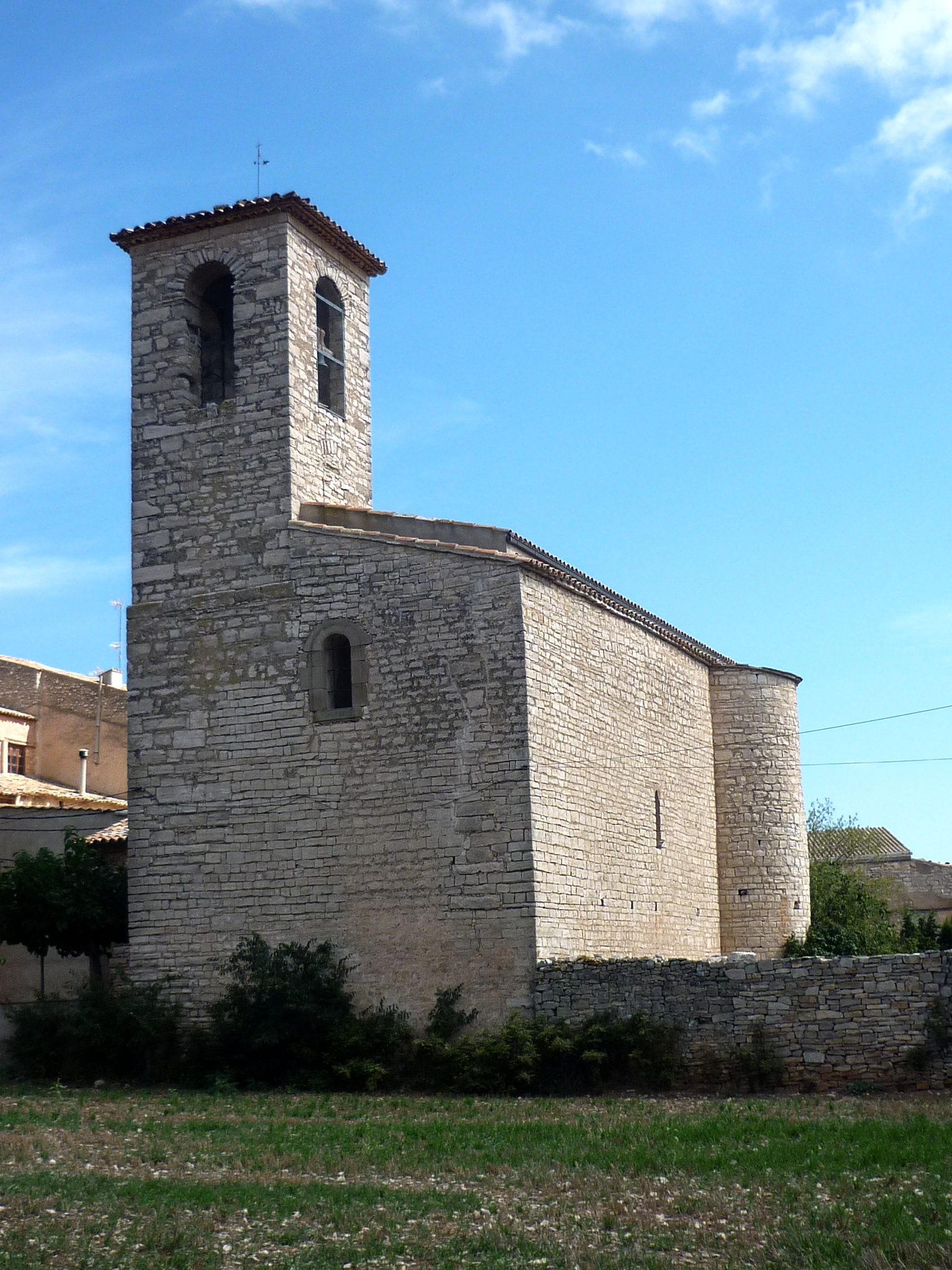 Església de Sant Pere de Santa Fe (les Oluges): vista des de ponent